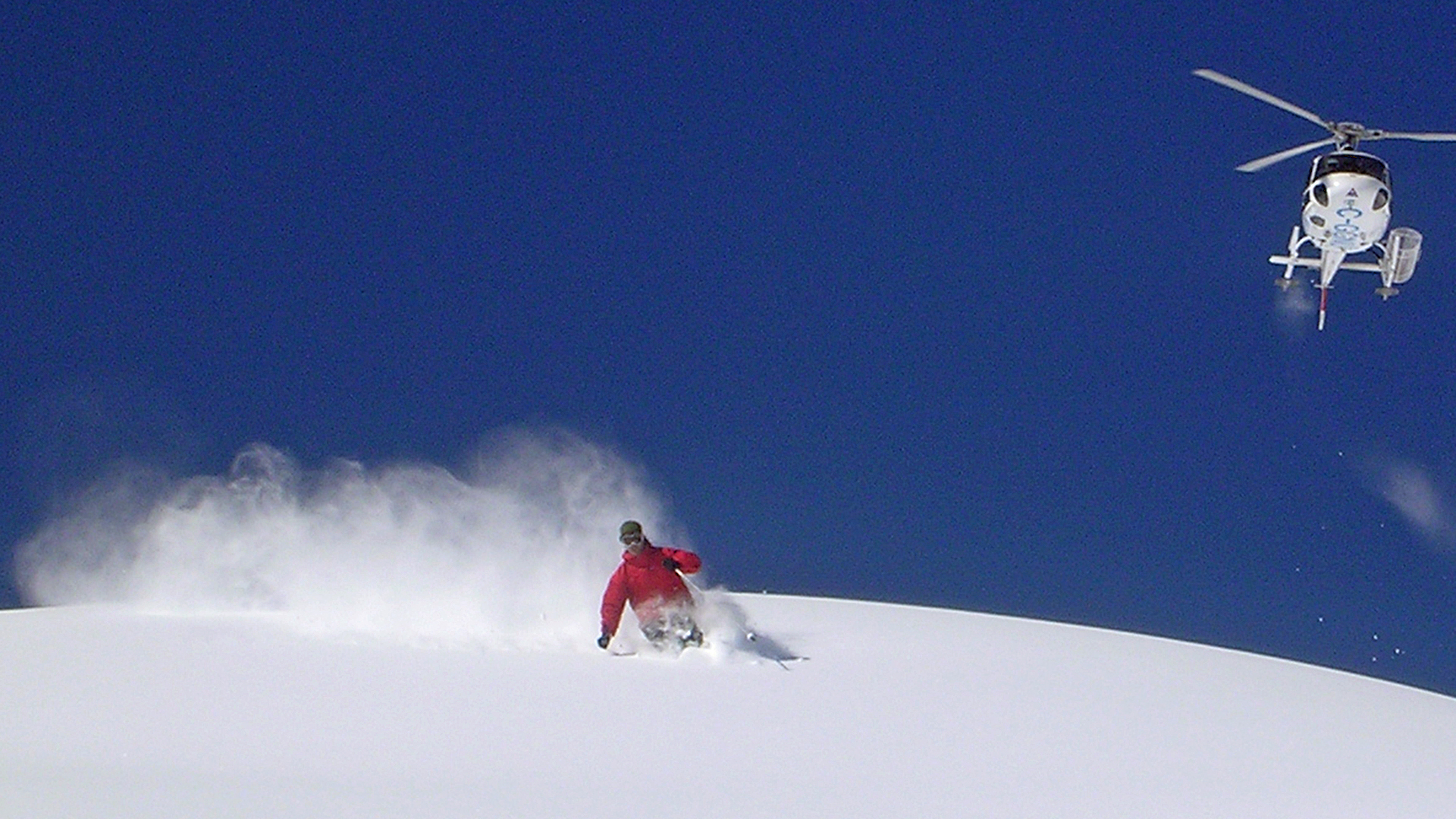 Helicopter über Tiefschneefahrer